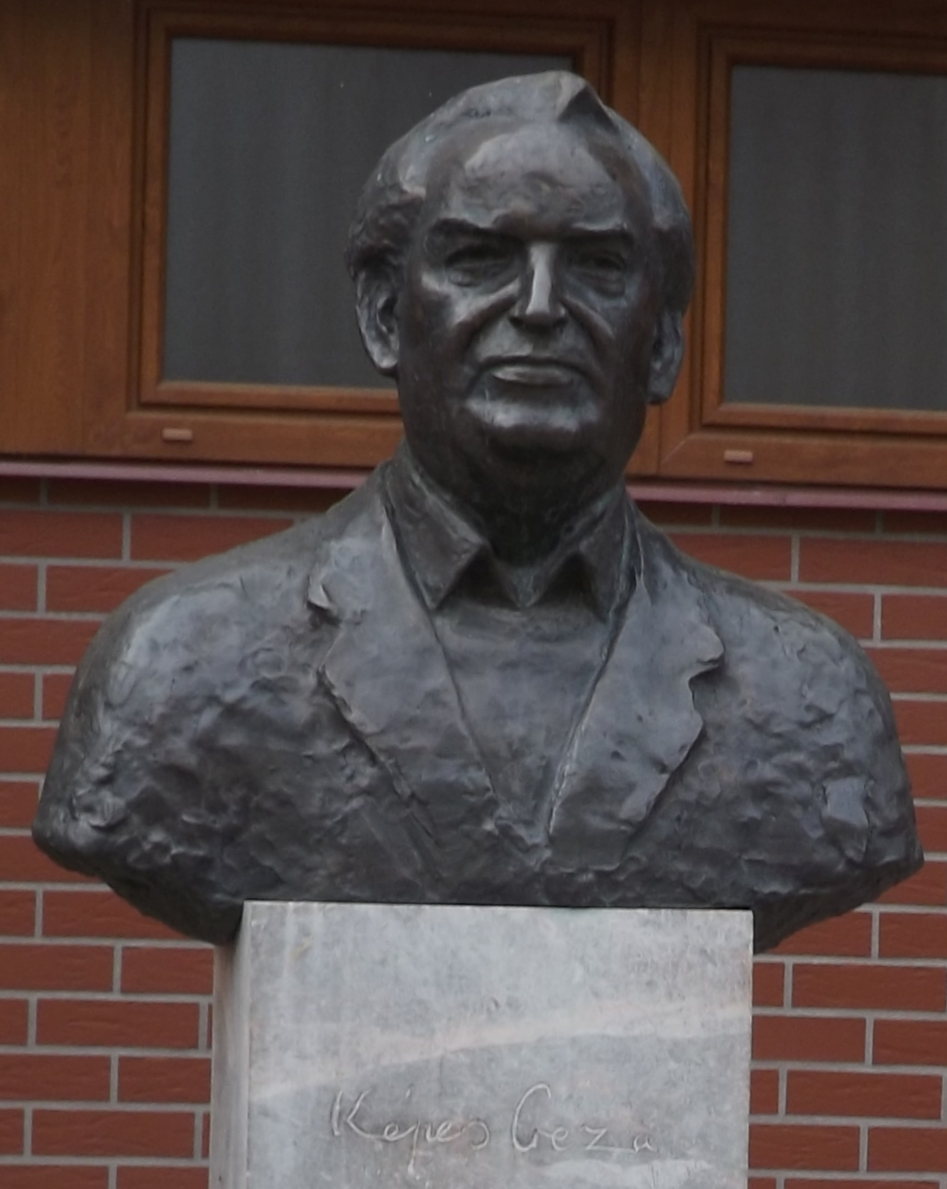 Képes Géza mellszobra Mátészalkán, a róla elnevezett általános iskola előtt